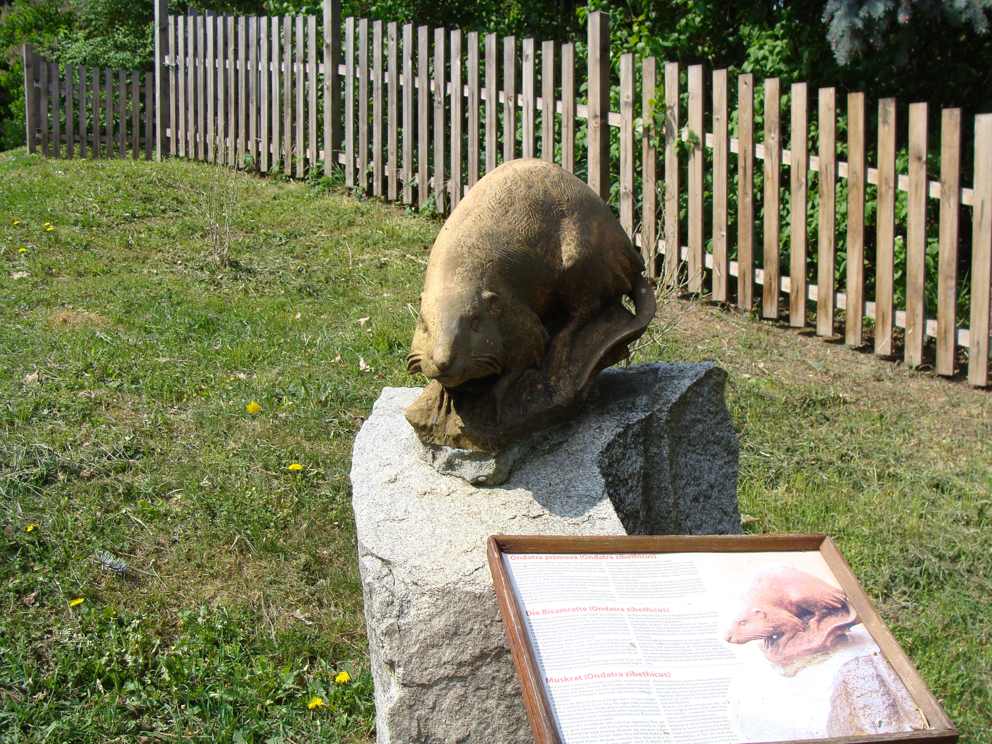 Ondatra zibethicus w miejscowości Dobŕiš (Czechy)